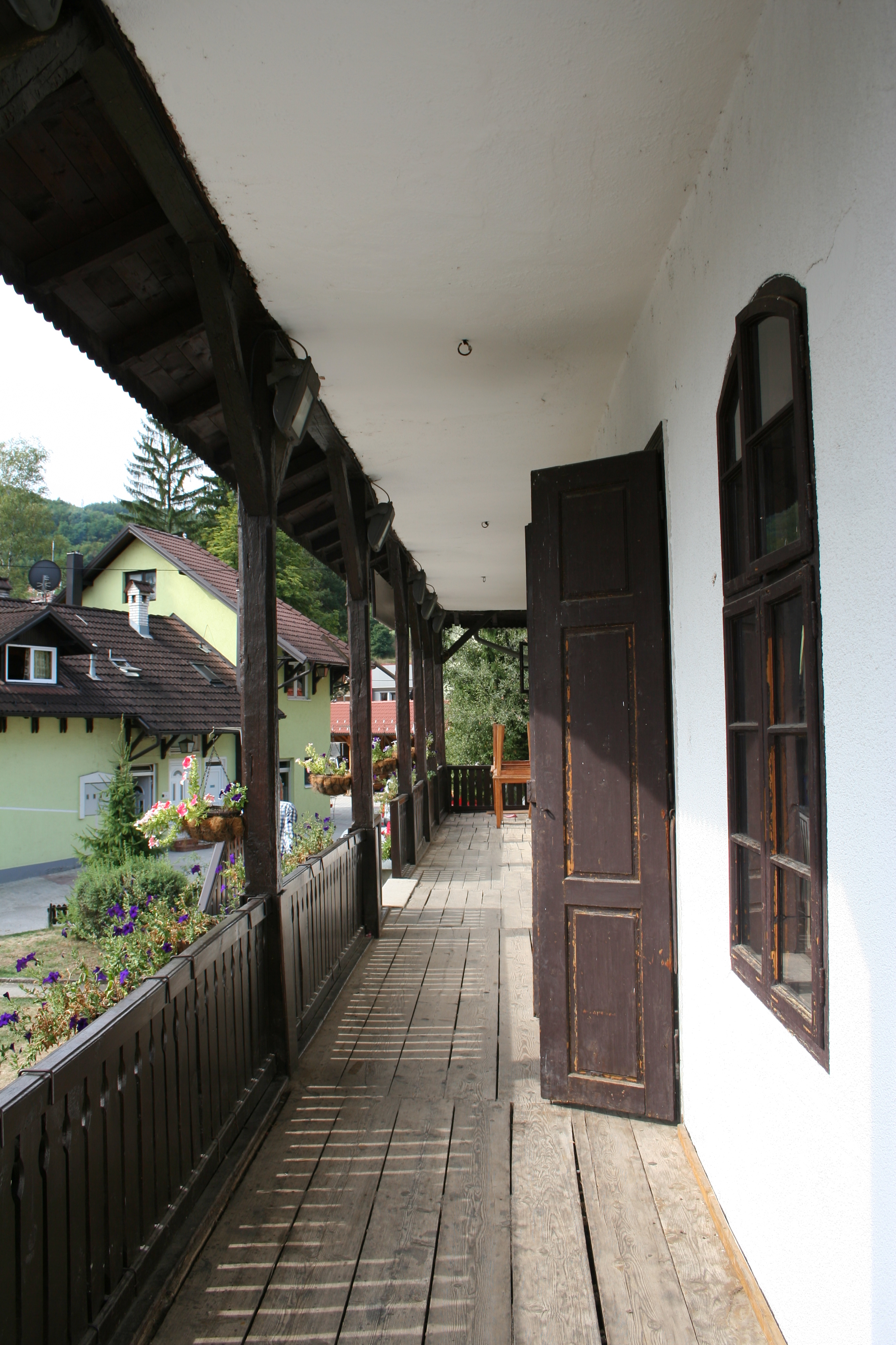 Stari han u Kosjeriću